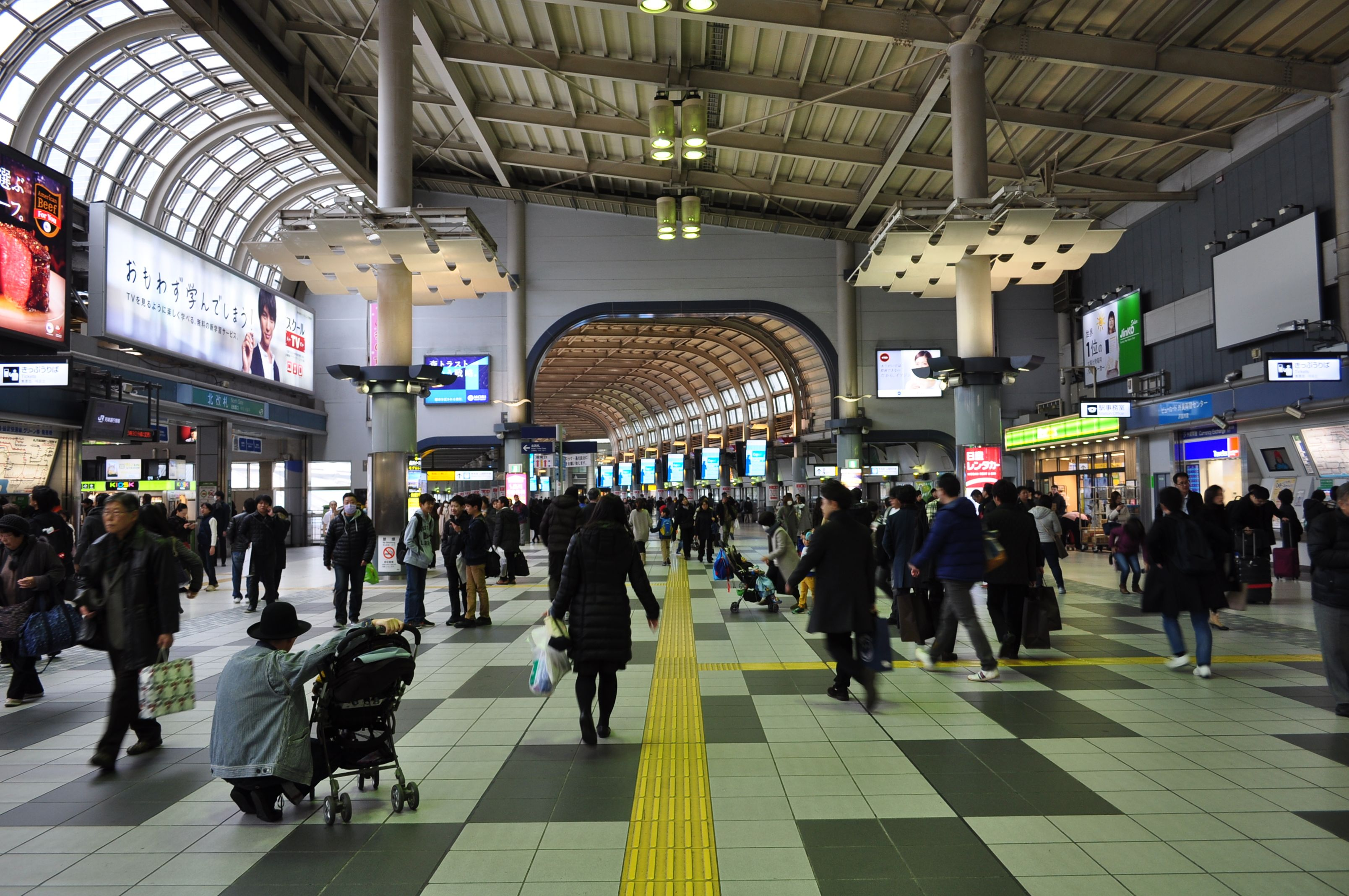 品川駅 コンコース